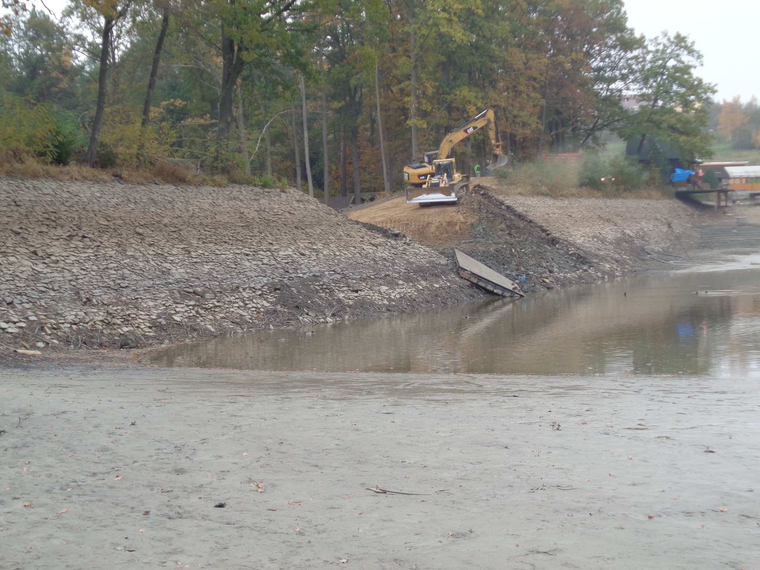 Rybník Mrhal u Hlincové Hory - rekonstrukce hráze (říjen 2018)